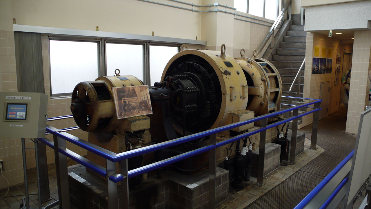 勝鬨橋直流発電機